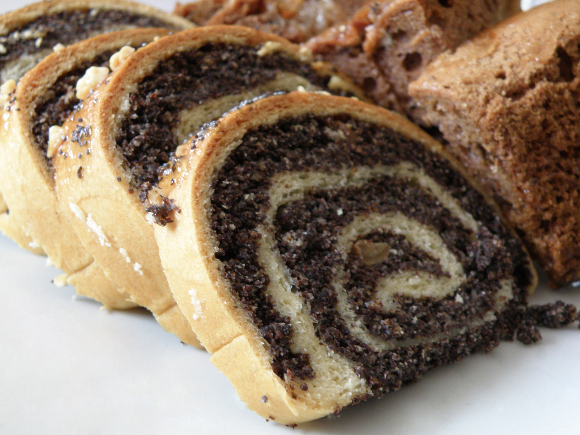 Makowiec - ciasto